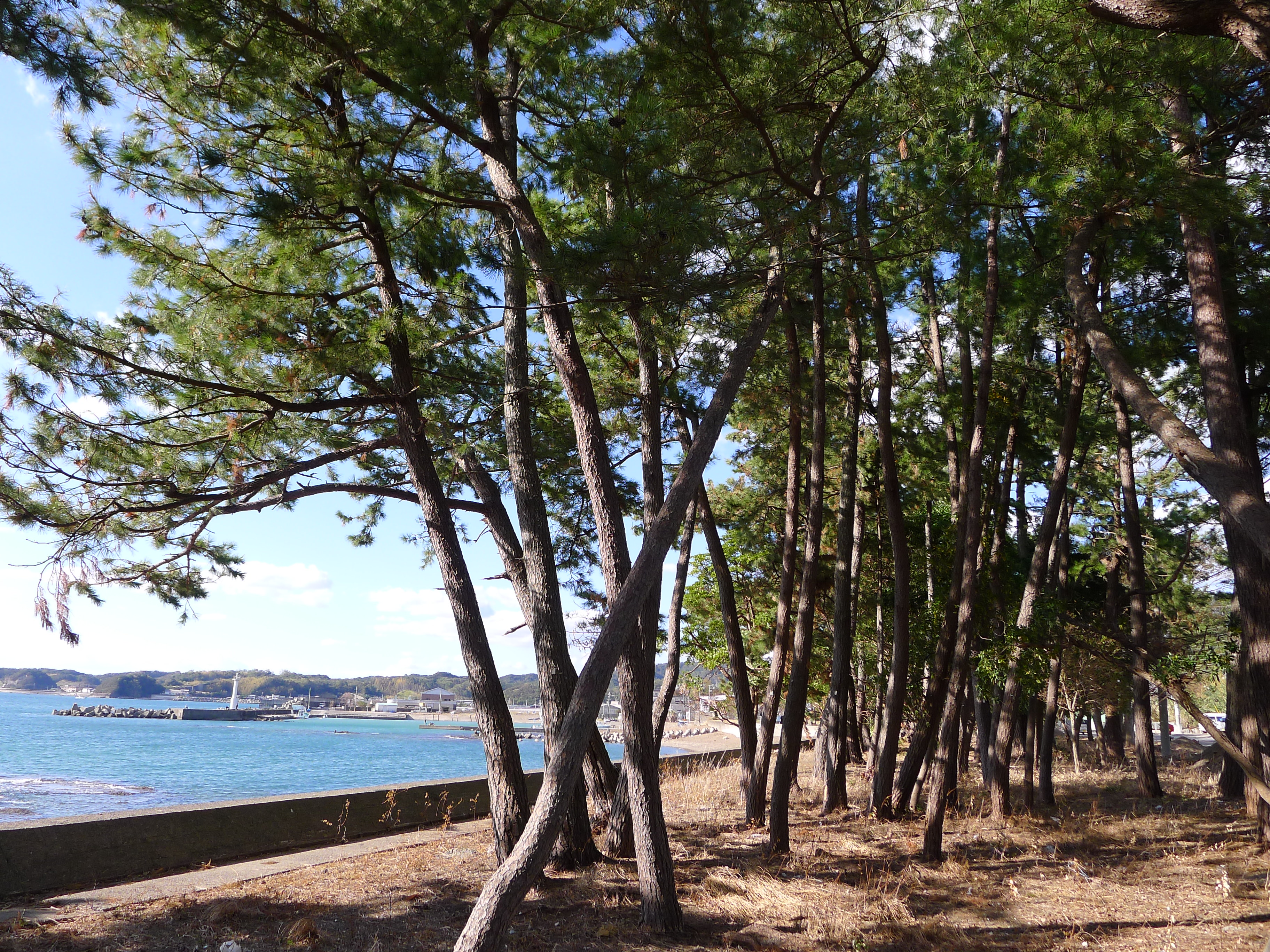 熊野古道紀伊路の名勝・芳養松原（和歌山県田辺市）